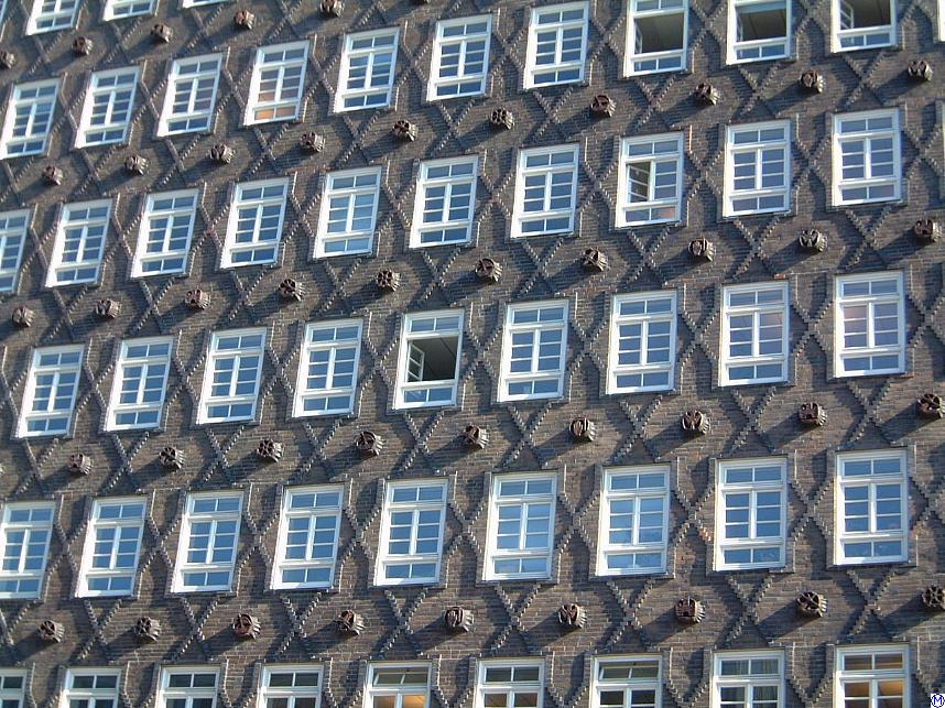 Fassadendetails am Sprinkenhof im Hamburger KontorhausviertelThis is a photograph of an architectural monument.